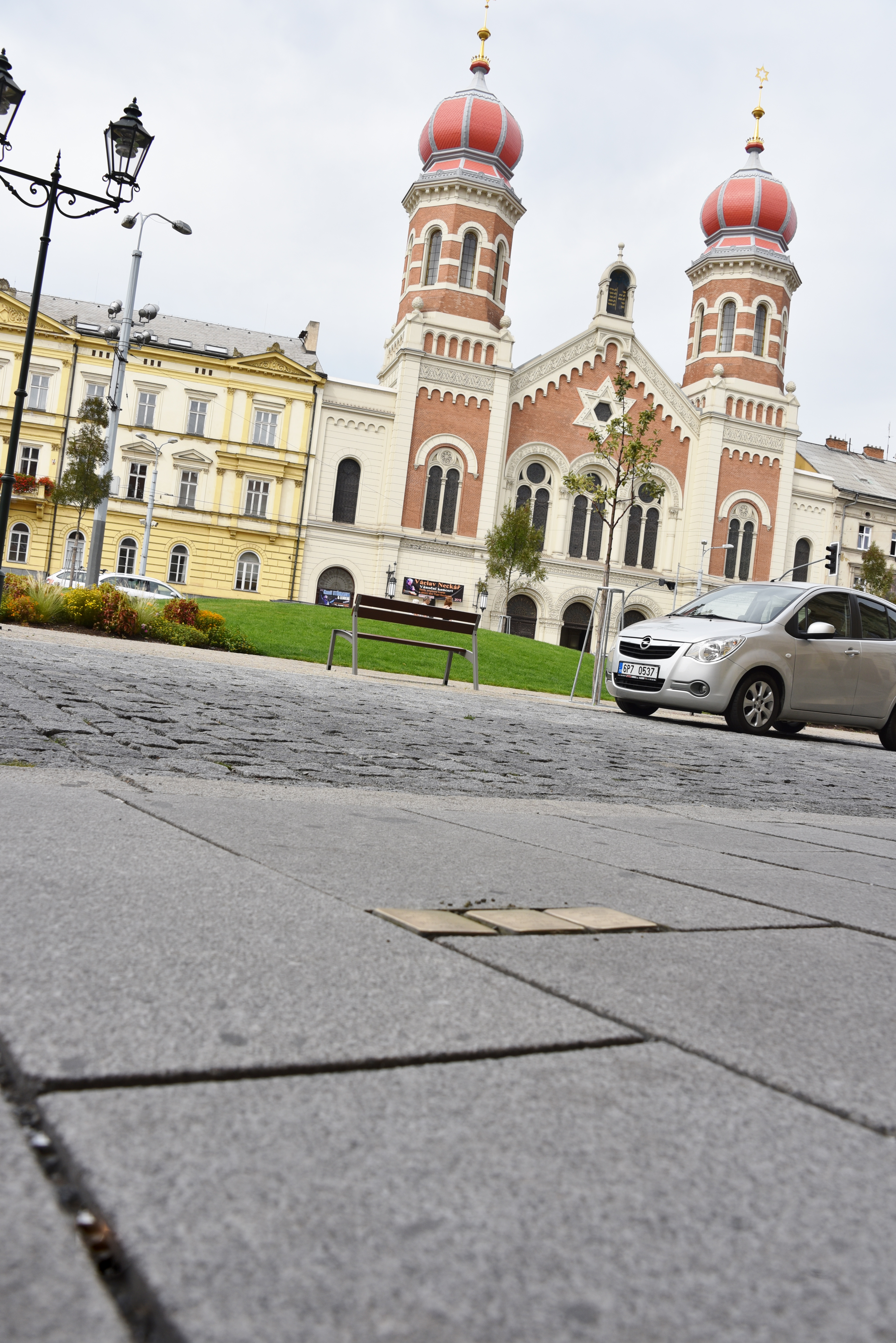 Stolpersteine für Familie Fanta in Pilsen